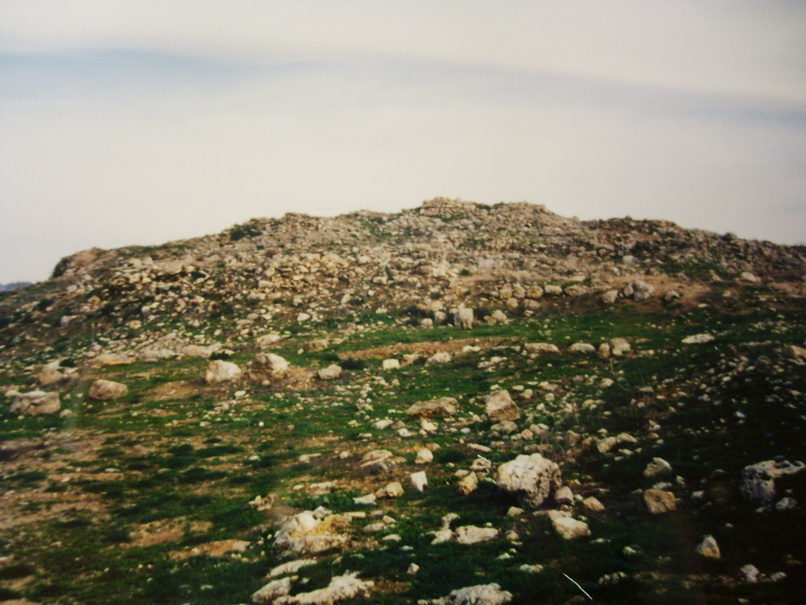 Kh. Tibneh, probablement le lieu de la sépulture de Josué de la Bible (Timnat Serah, Thamnachar).